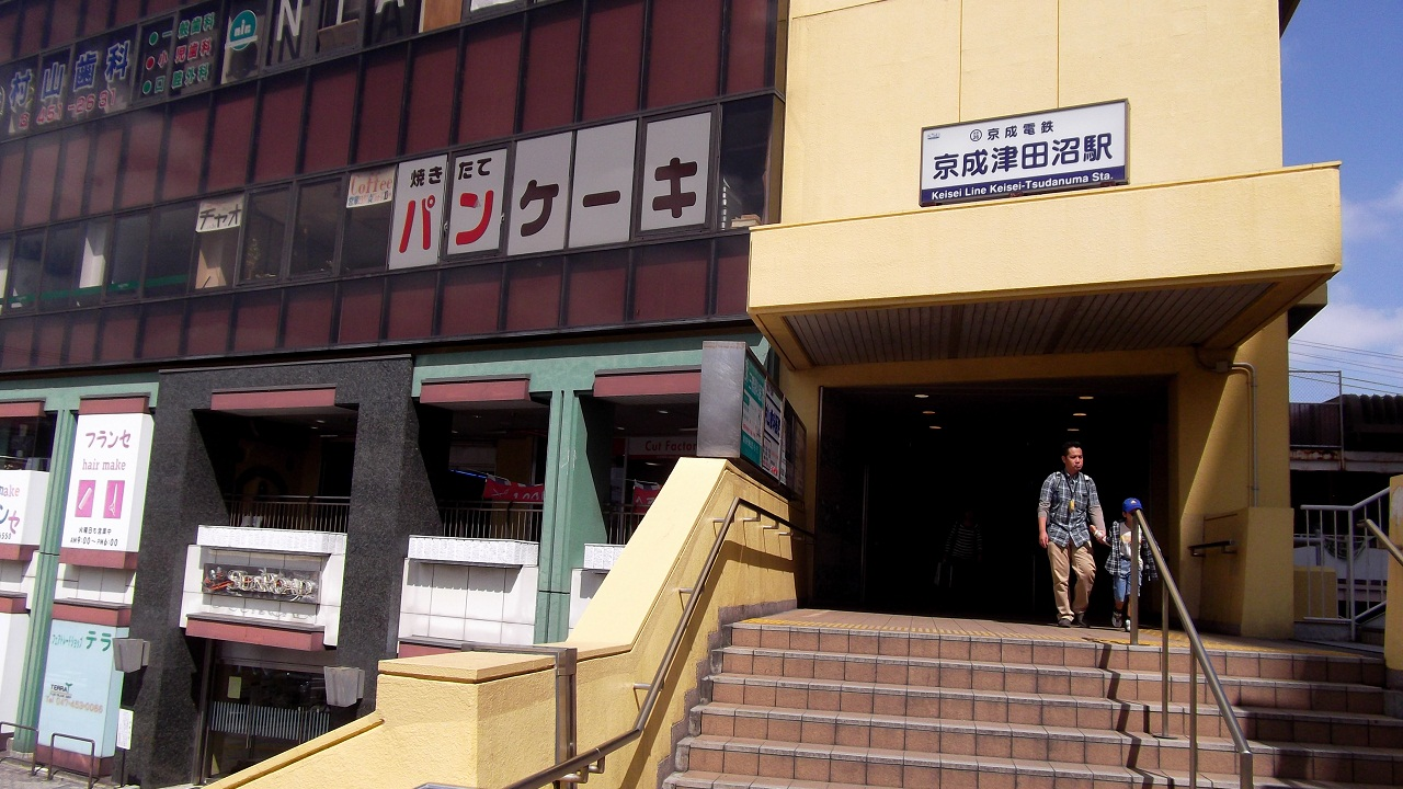 京成津田沼駅の駅舎（南口）